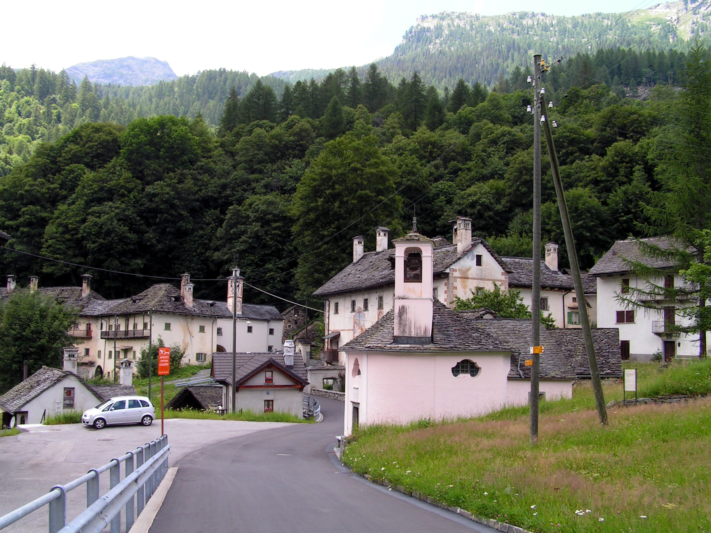 Campo Vallemaggia. Vue générale des maisons Pedrazzini avec l'oratorio di Santa Maria Addolorata au premier plan.